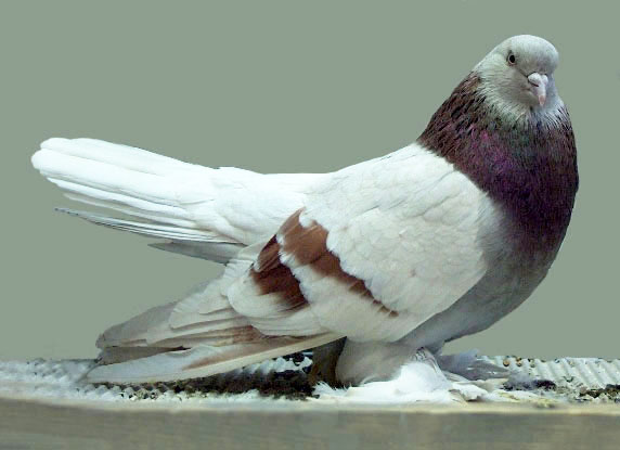 Persian Roller (Mealie)